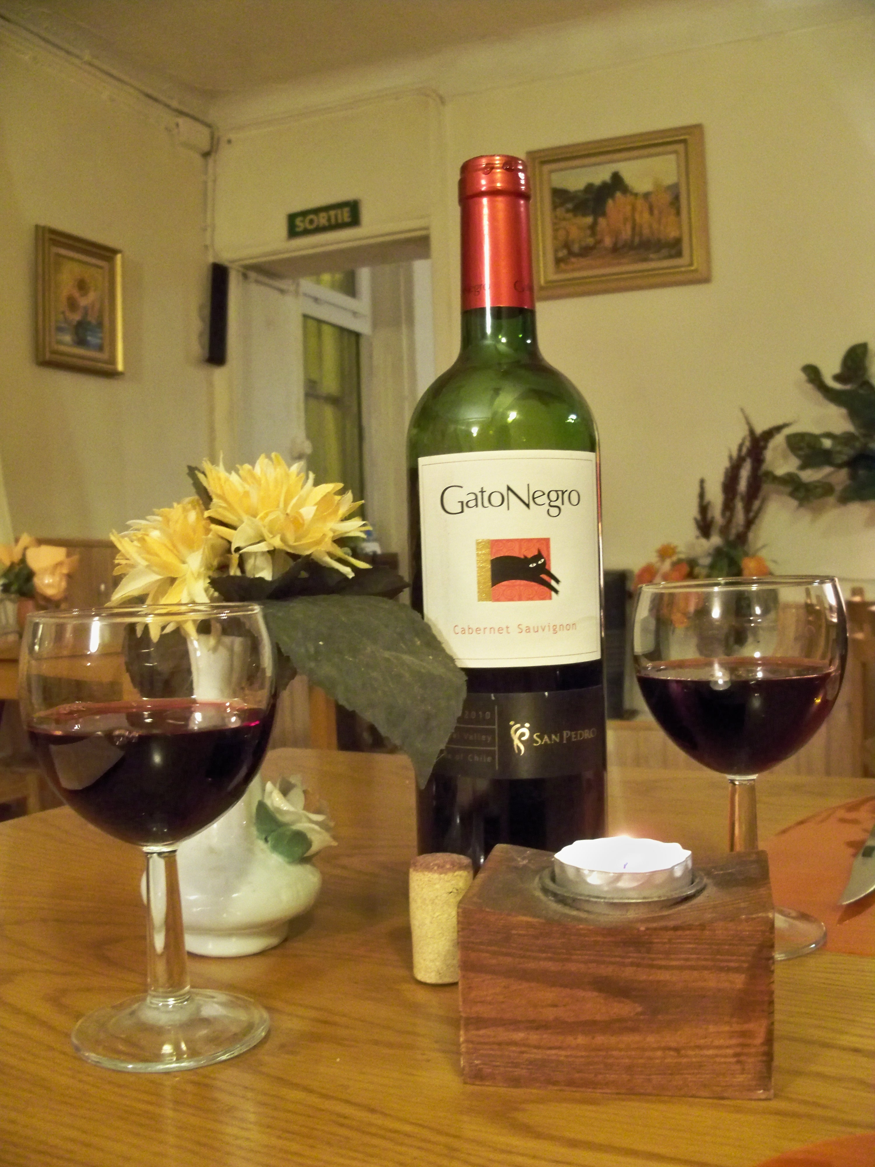 bouteille de cabernet sauvignon du Chili